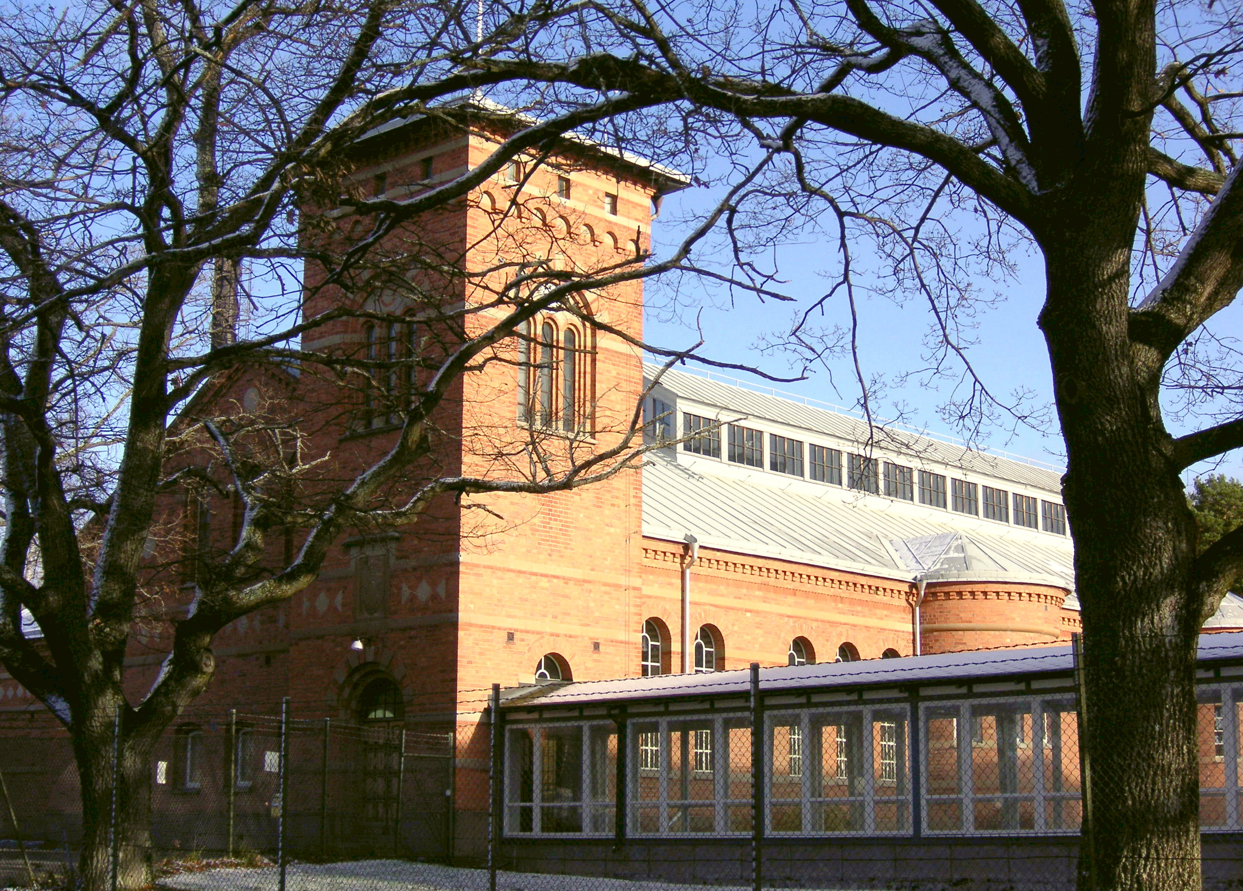 Norsbors vattenverk, maskinhallen